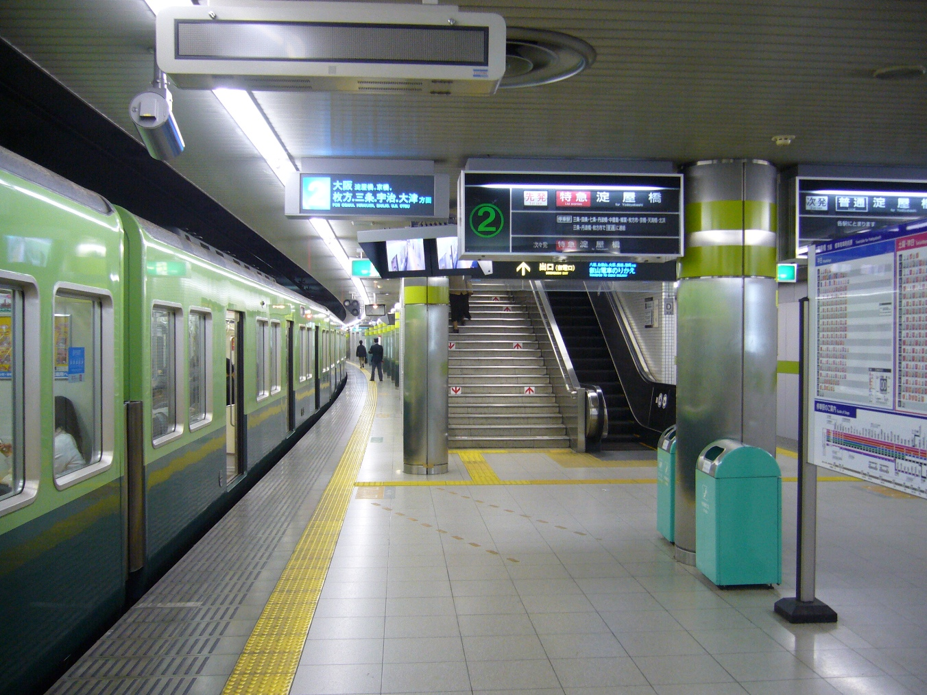 京阪電気鉄道京阪本線出町柳駅の地下ホーム。1面2線のホームを持つ。2007年11月7日に投稿者が撮影。